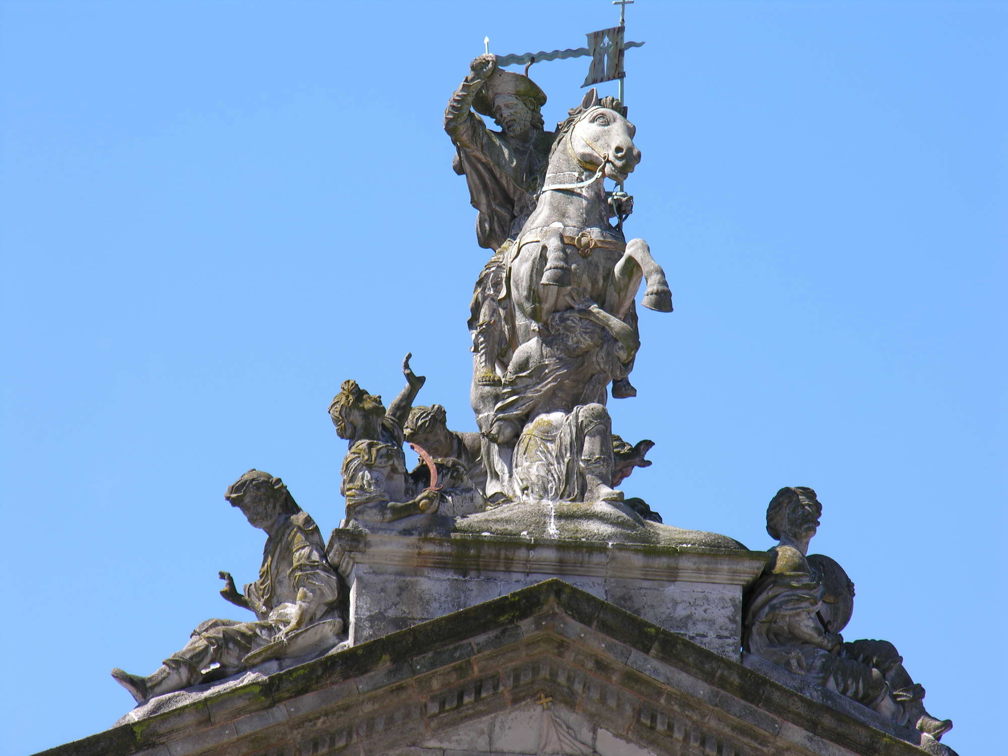 self made. Santiago de Compostela, Galicia